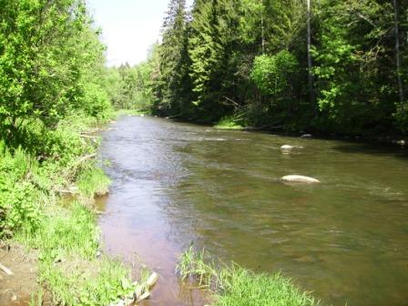 Sista River, Leningrad Oblast